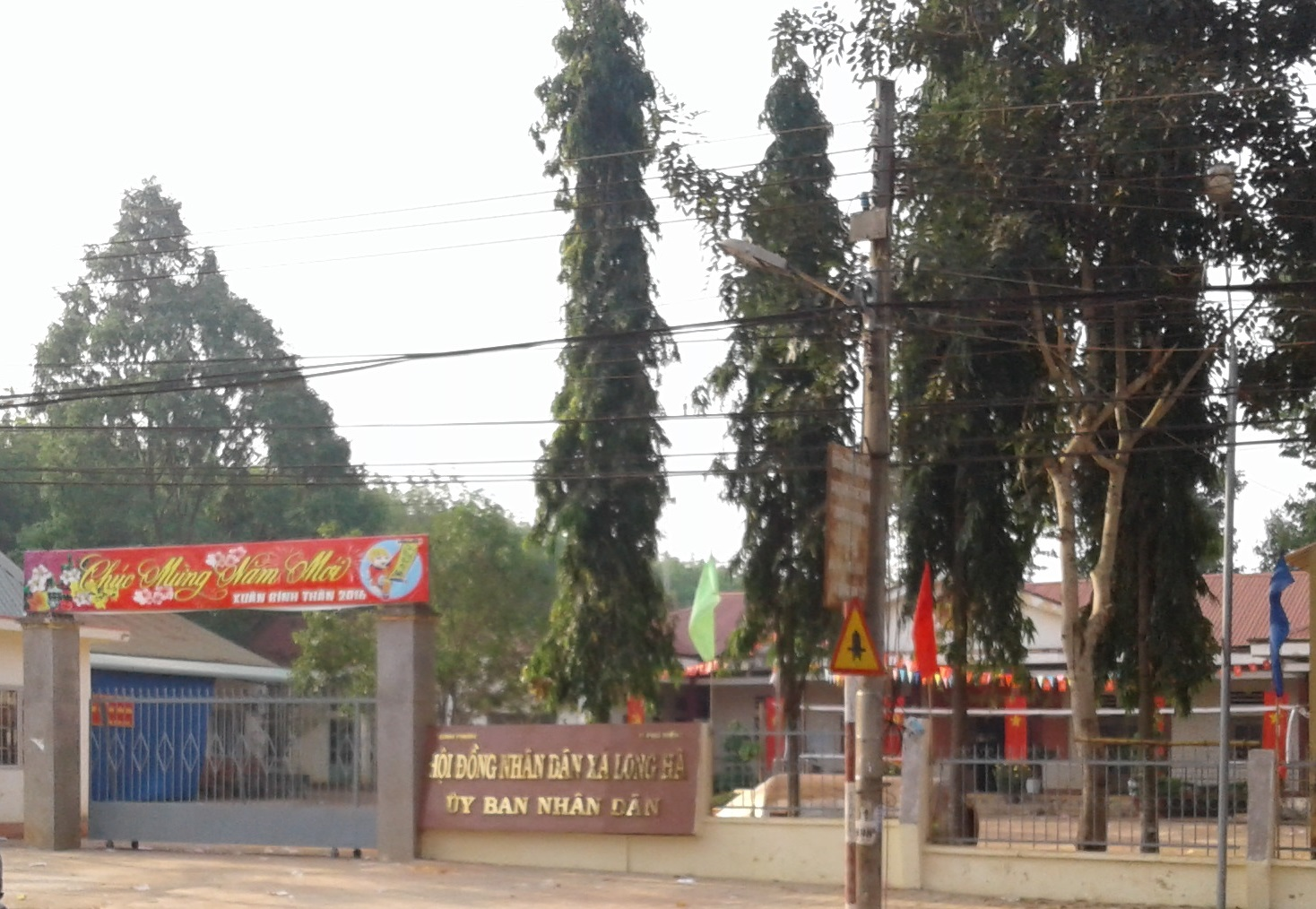 Trụ sở UBND xã Long Hà